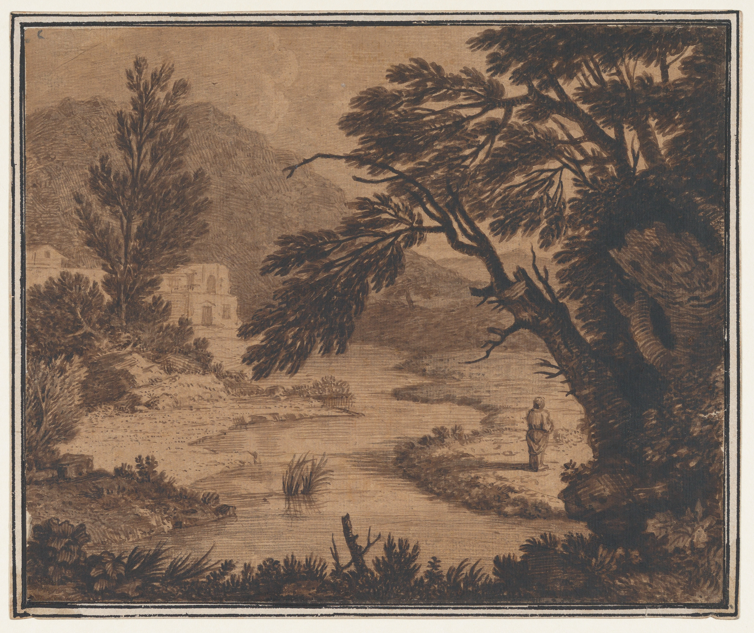 Drawing; Drawings